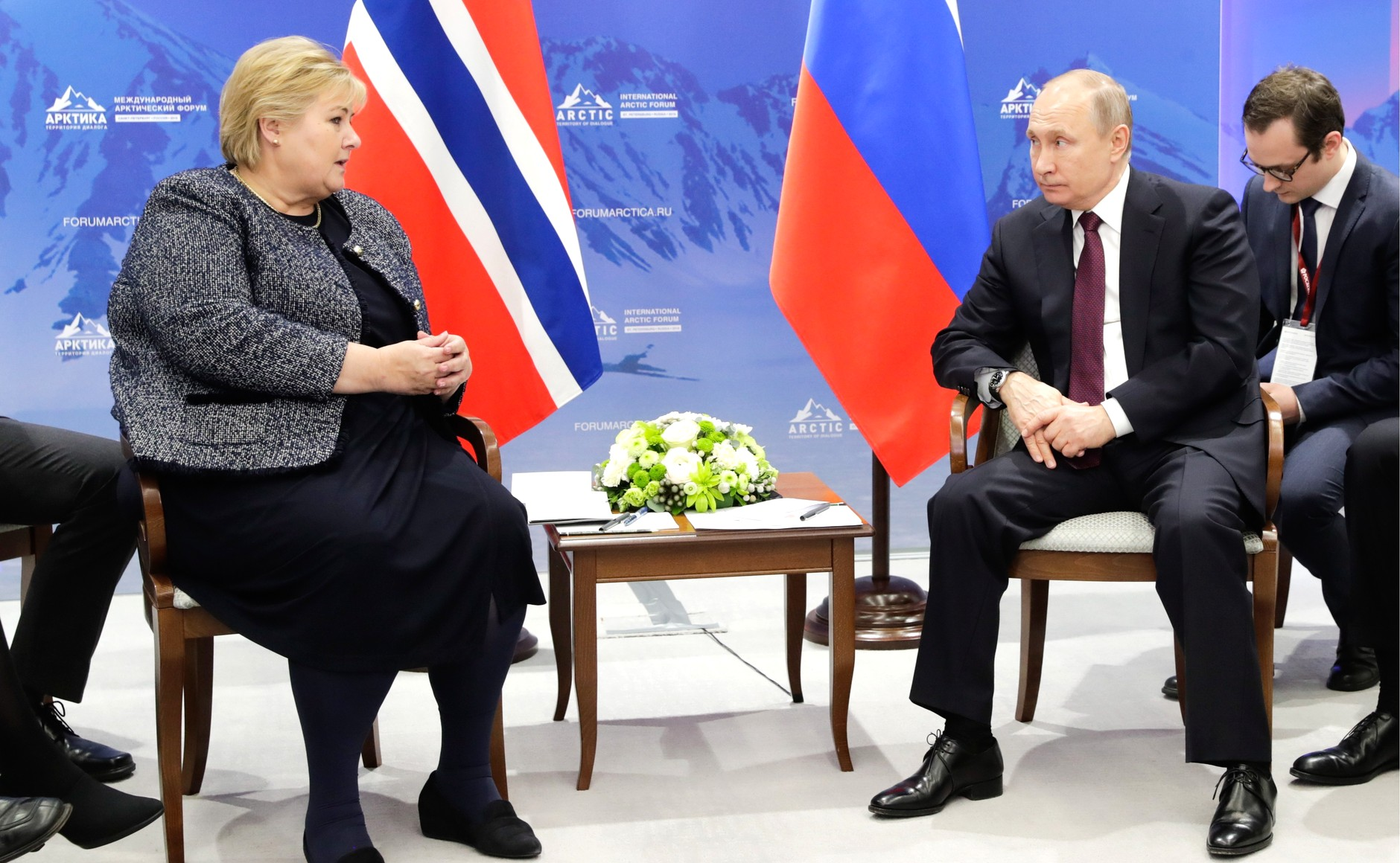 Встреча Президента Российской Федерации Владимира Путина с Премьер-министром Норвегии Эрной Сульберг